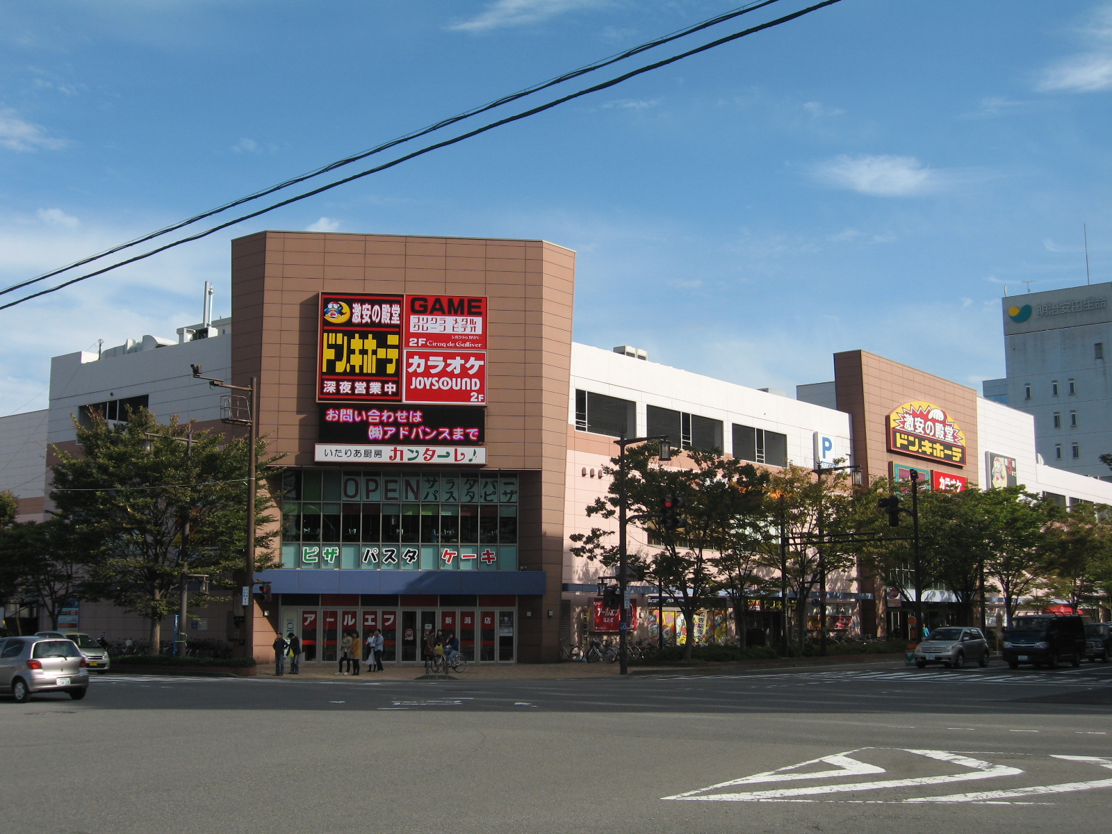 ひろもぎビルの画像。